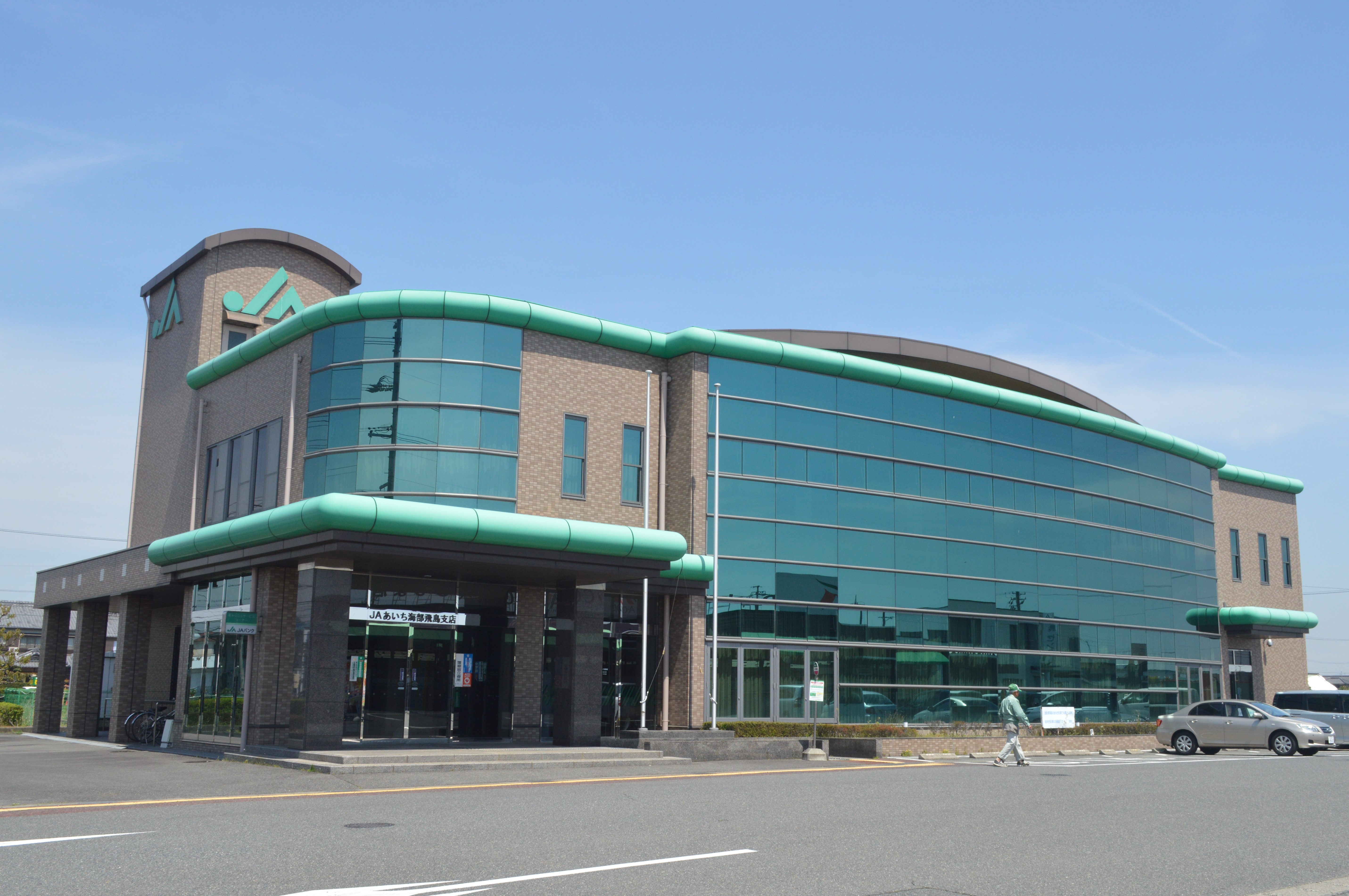 愛知県海部郡飛島村にあるJAあいち海部（あいち海部農業協同組合）飛島支店。